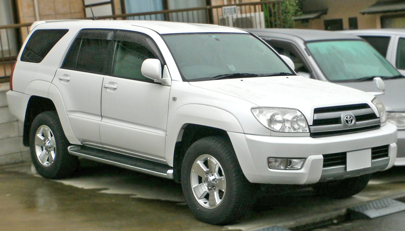 Toyota_Hi-Lux-Surf (2002 - 2005)